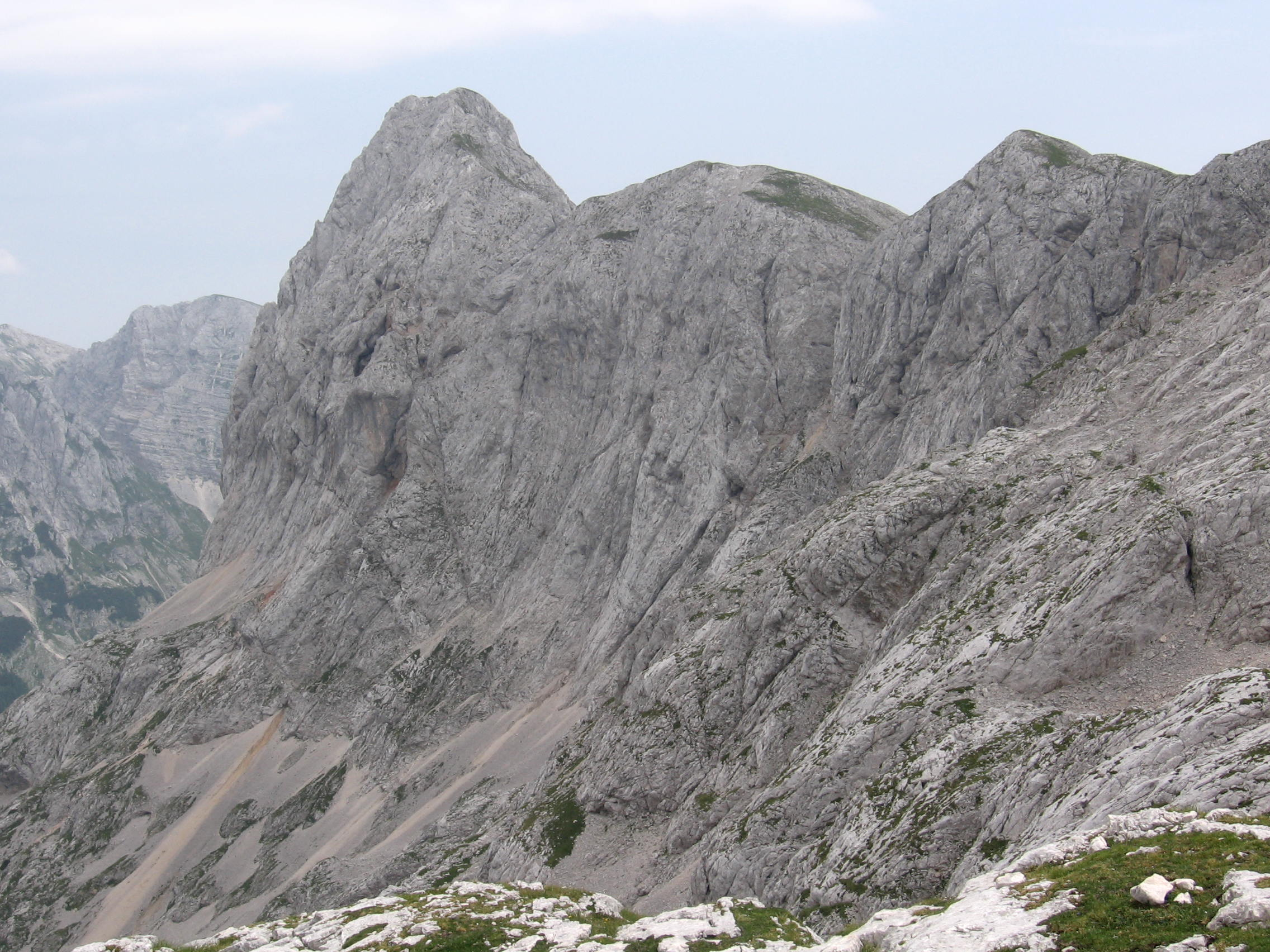 Mišelj vrh z grebenom proti Mišeljskemu Koncu, nad Velsko dolino